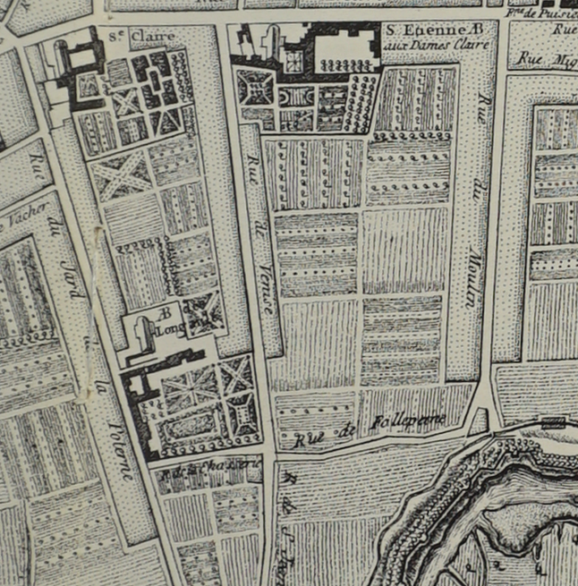 partie sud.